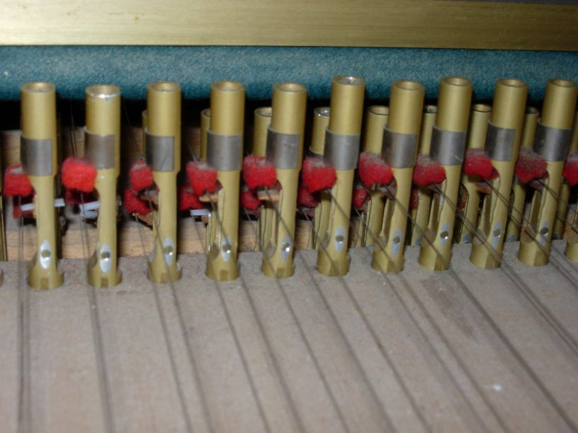 sautereaux métalliques Neupert type "OK" - les becs d'origine en cuir hors d'état ont été partiellement substitués par des becs en Delrin sans aboutir à un fonctionnement satisfaisant